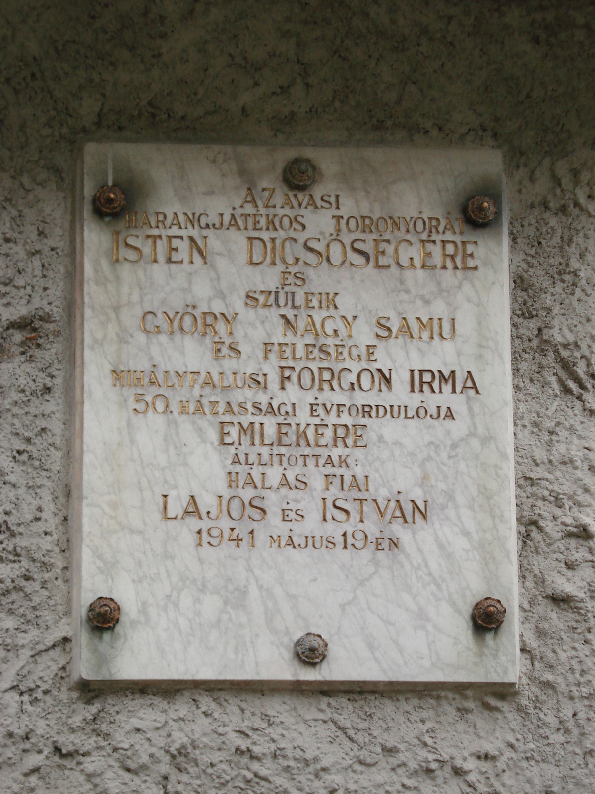 Avasi harangtorony (Miskolc, Avas) This is a photo of a monument in Hungary. Identifier: 2927